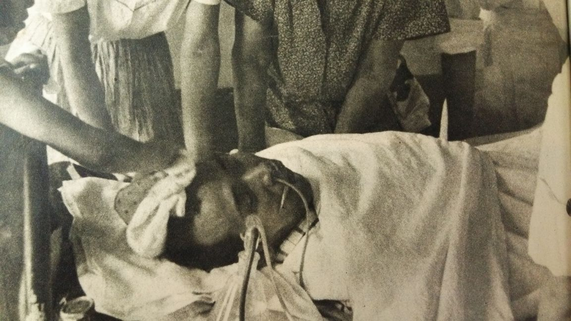 第五福竜丸無線長、久保山愛吉（死の直前）